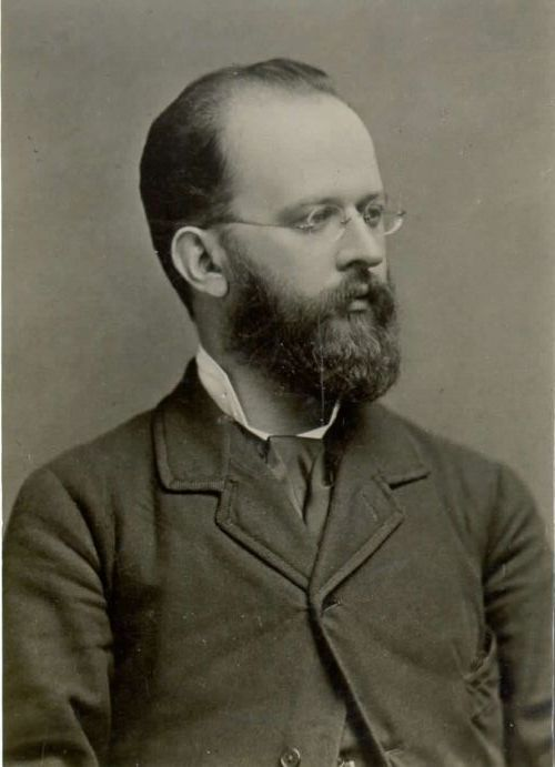 Janez Šubic (1850-1889), Slovene painter.